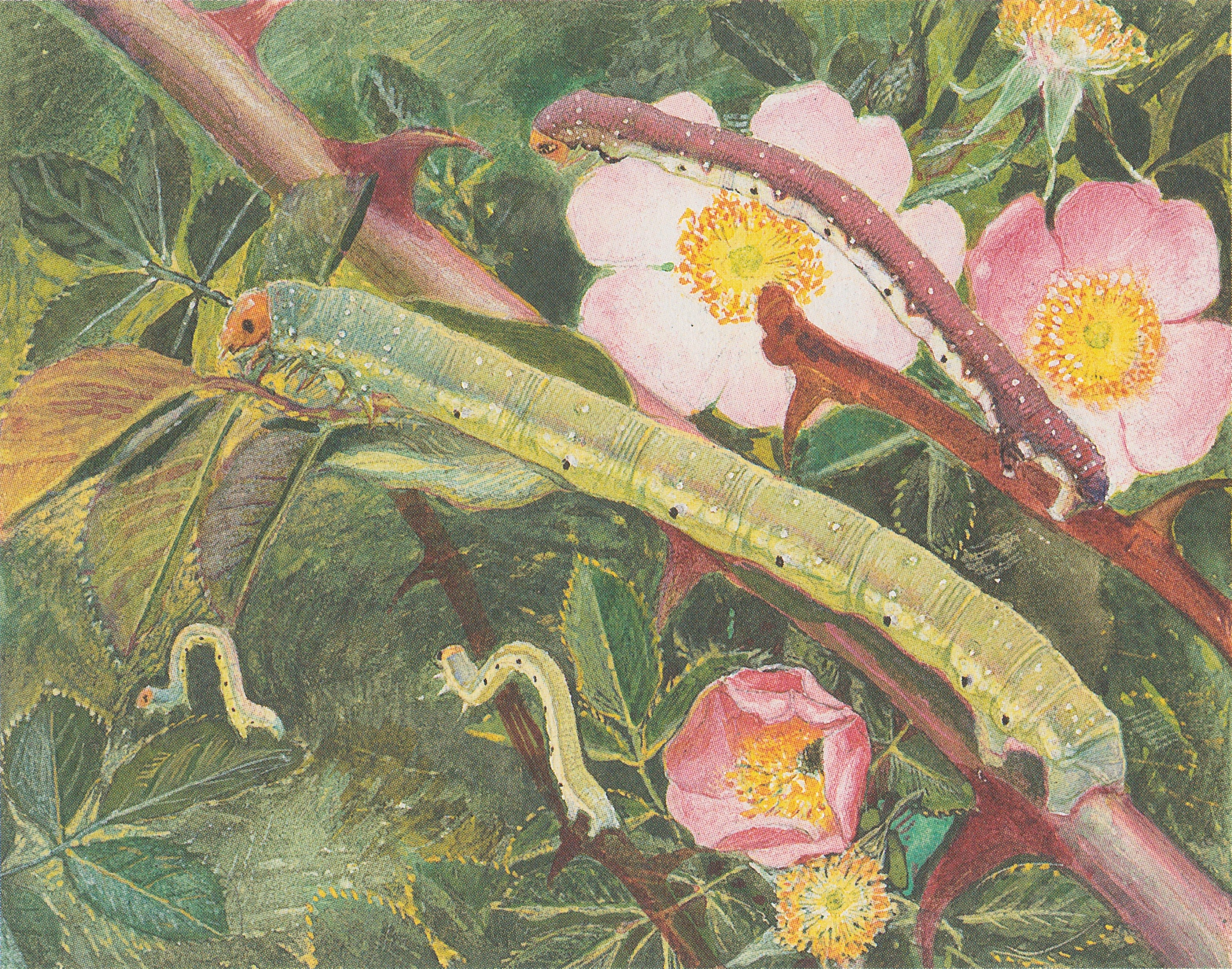 Raupen des Rosenblattspanners (Earophila badiata, früher Anticlea badiata) auf einer Hundsrose (Rosa canina)